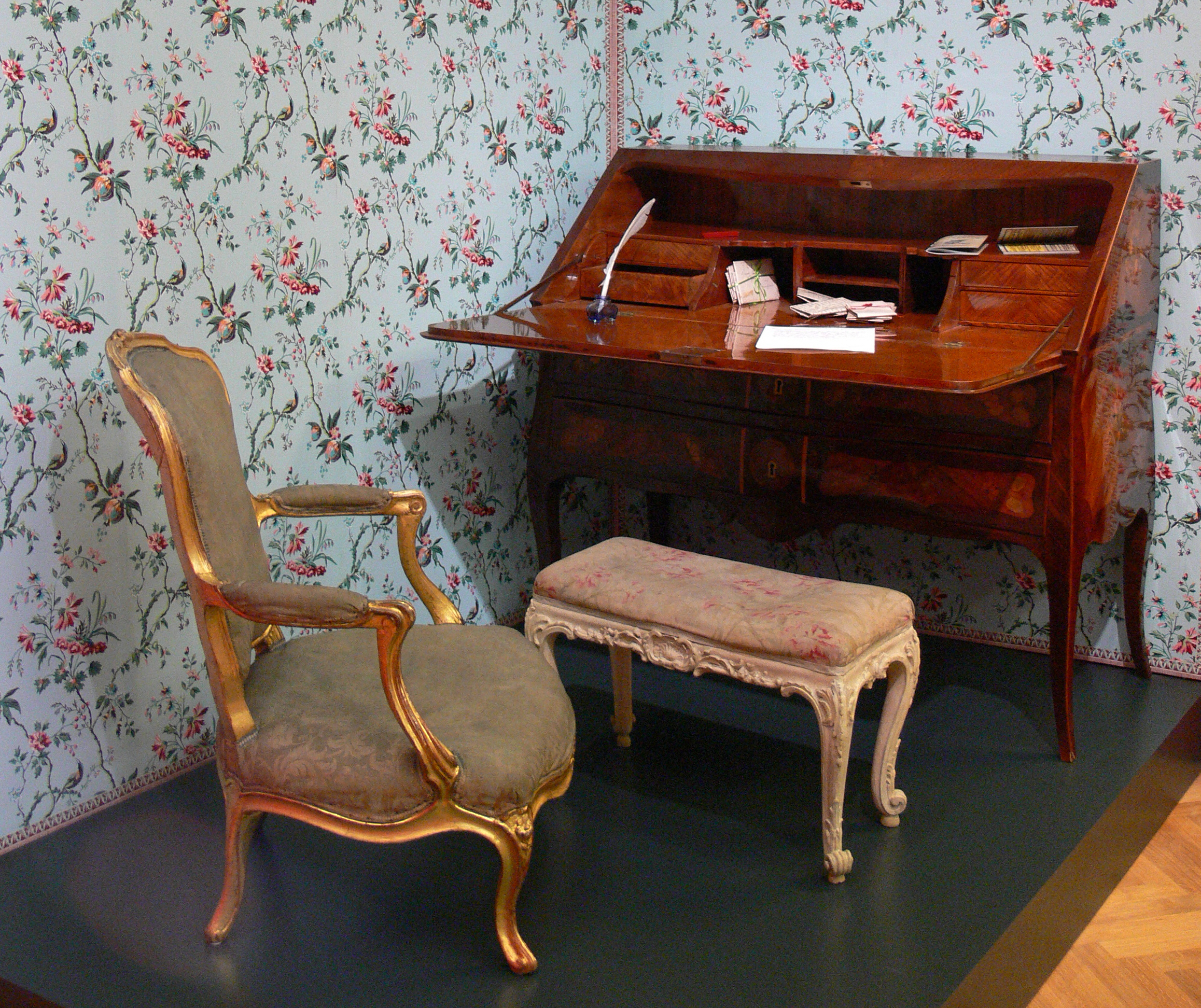 Inszenierung eines Schreibkabinetts aus dem 18. Jahrhundert Tapete: Reproduktion einer Papiertapete aus dem Schwetzinger Schloss, um 1775 Damensekretär, vermutlich Süddeutschland, um 1770 Sessel, um 1740 Hocker aus dem Mannheimer Schloss, Mannheim, um 1760 Gallery: Reiss-Engelhorn-Museen, Mannheim